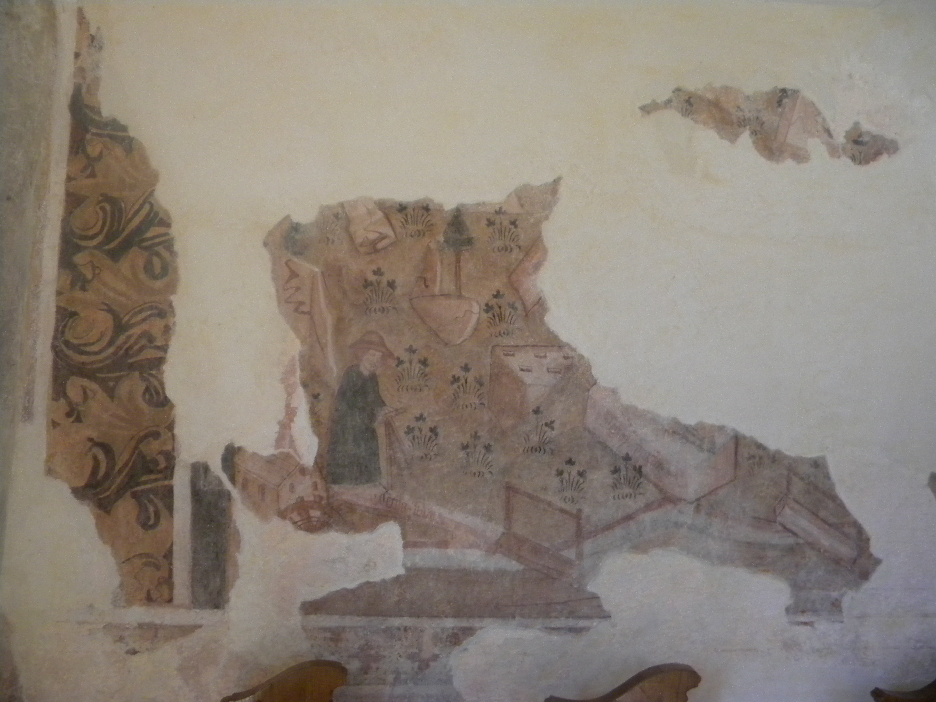 Freska v Šmatevžu.